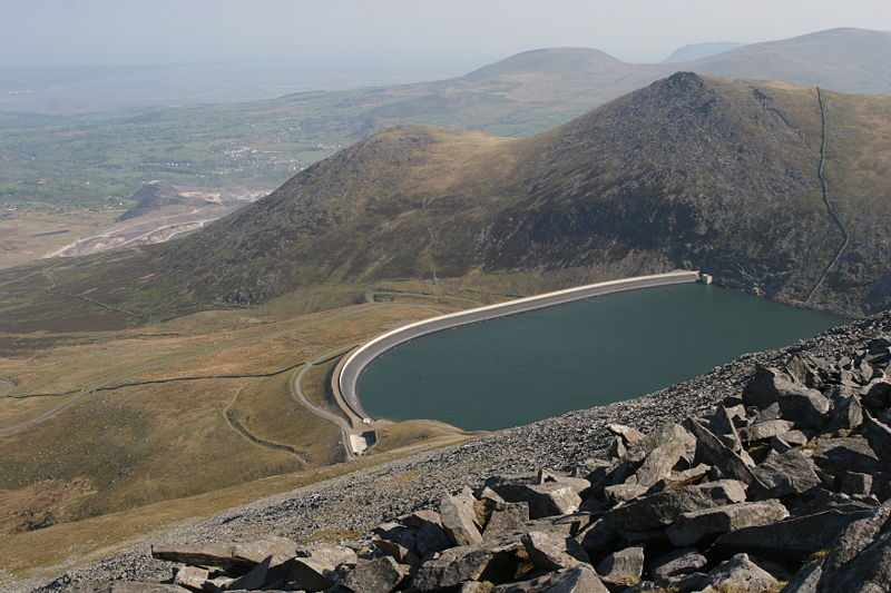 Marchlyn Mawr from Elidir Fawr summit